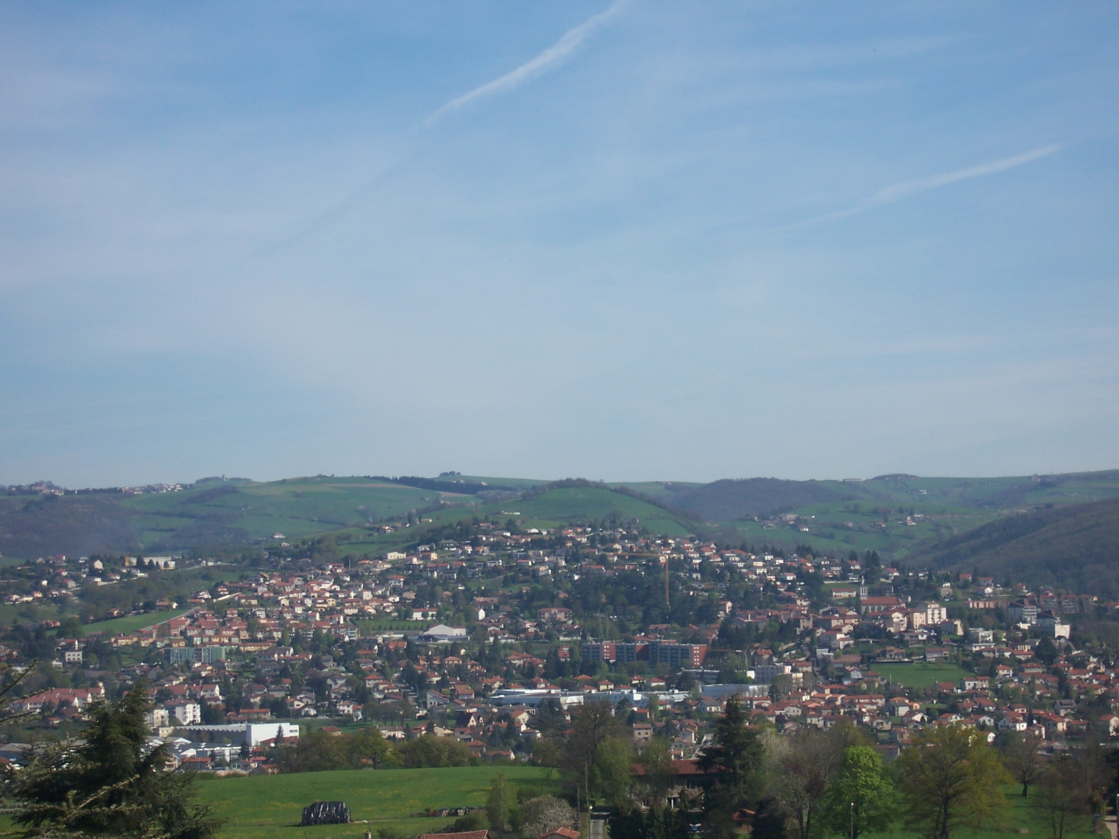 Vue de la commune de Sorbiers